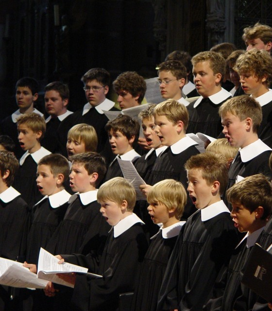 Windsbacher Knabenchor (Windsbach Boys Choir)